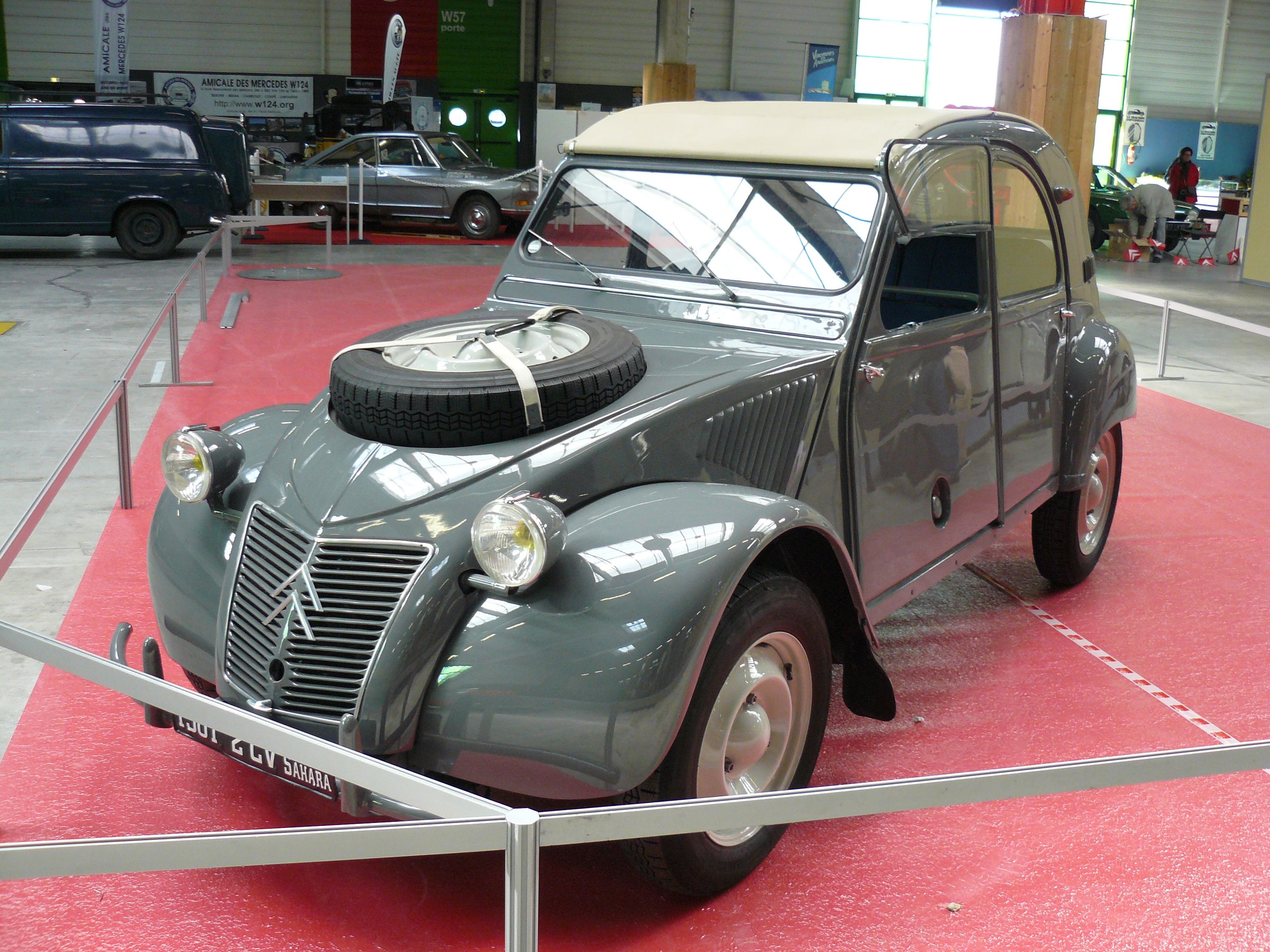 Automedon 2012.